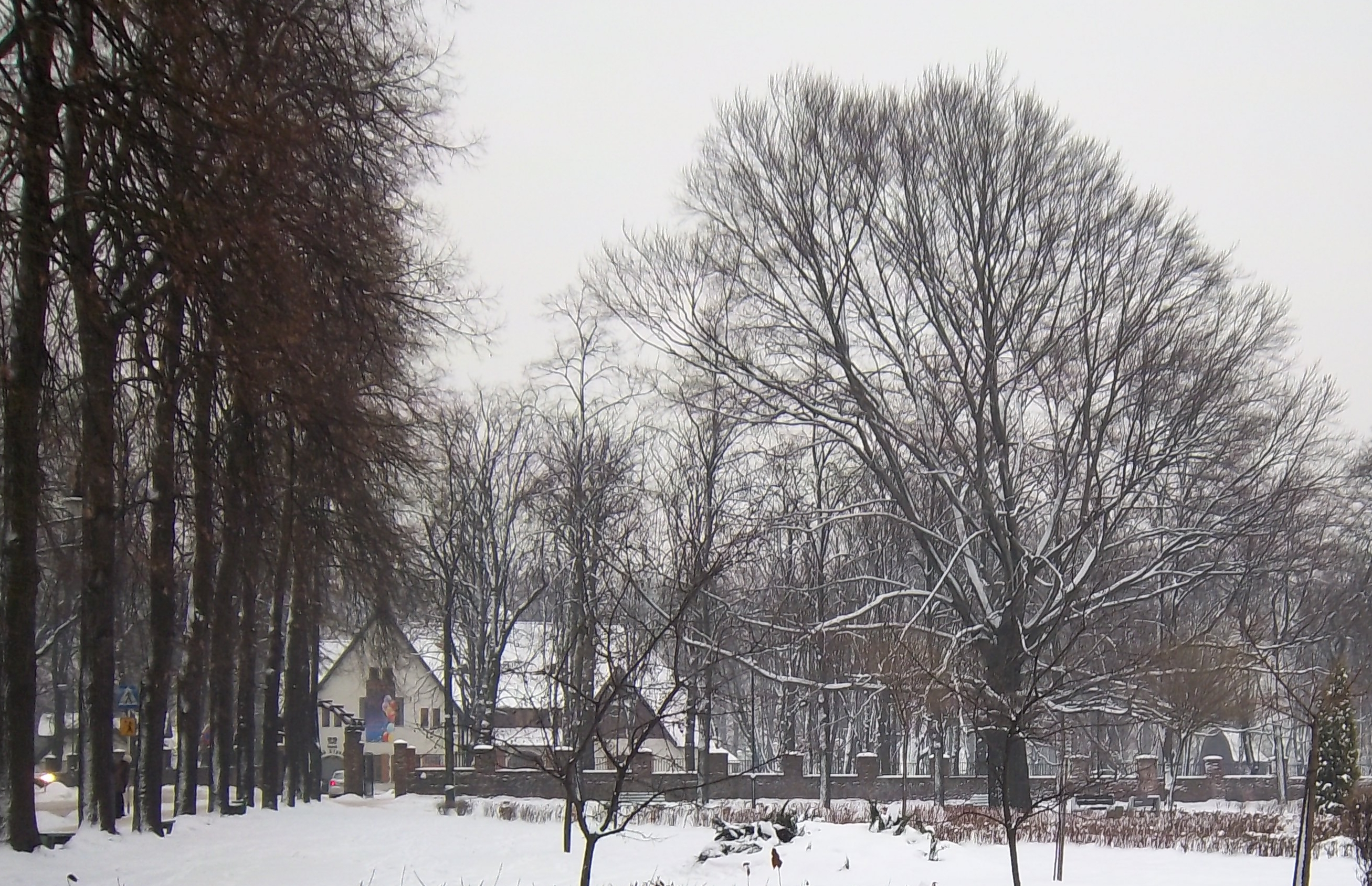 Plac Pod Lipami w Giszowcu - od lewej Karczma Śląska, po prawej widoczny zabytkowy buk.